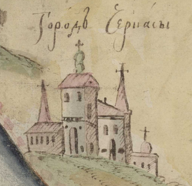 Фрагмент карти Київської губернії. XVIII століття. РГАДА, ф. 192, оп. 1, Киевская губ., № 5.